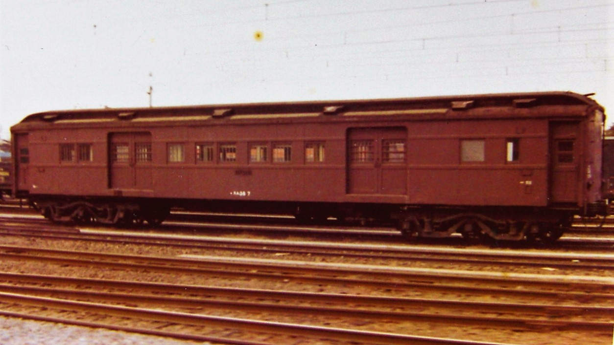 国鉄スエ38形客車 38 7 1982年茅ヶ崎機関区撮影